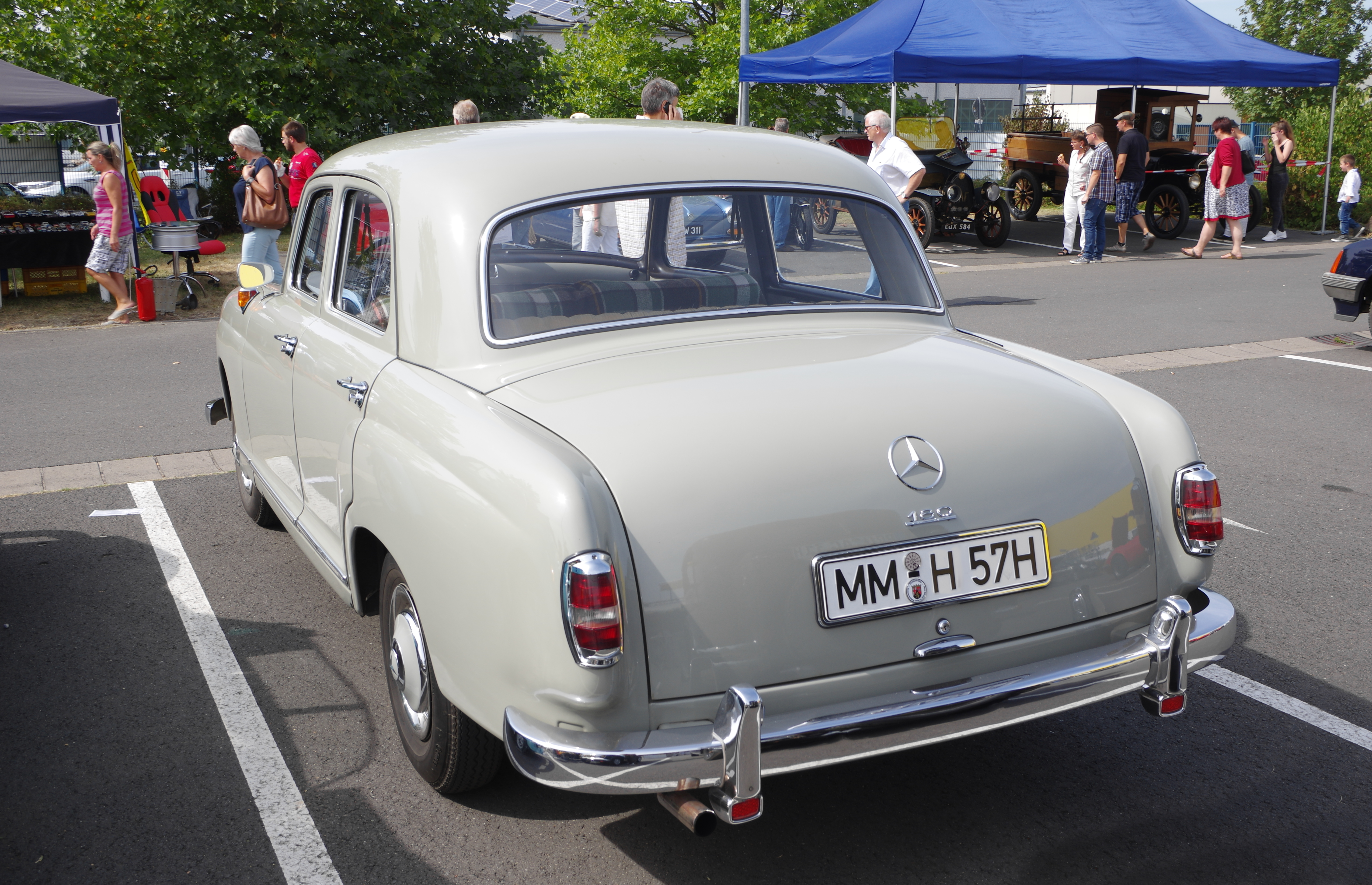 Mercedes Benz 180 W120, Baujahr 1957, 1800 cm³, 65 PS , Bitburg Classic 2016, Das Nummernschild ist verfälscht!